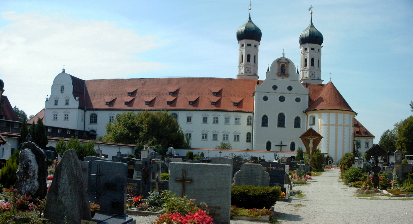 Kloster Benediktbeuren / Monastery Benediktbeuren Bayern, Deutschland / Bavaria, Germany